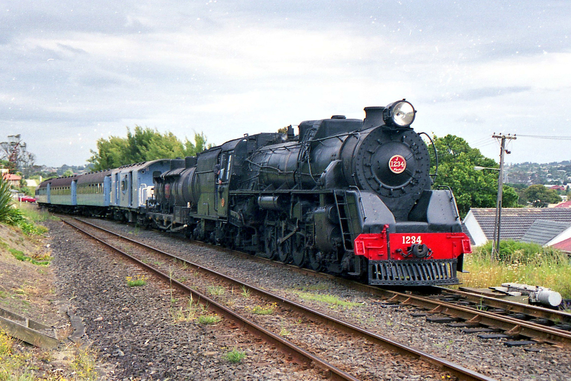 Auckland,New Zealand